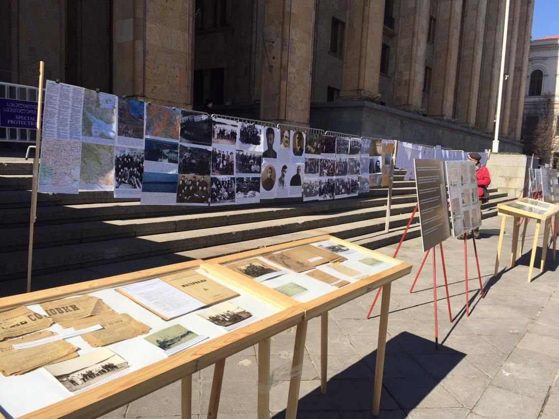 გასაბჭოების შედეგები საქართველოში - რეპრესირებულთა ფოტოებისა და სიების სახით""